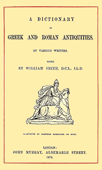 Frontespizio delle Dizionario delle antichità greco-romane